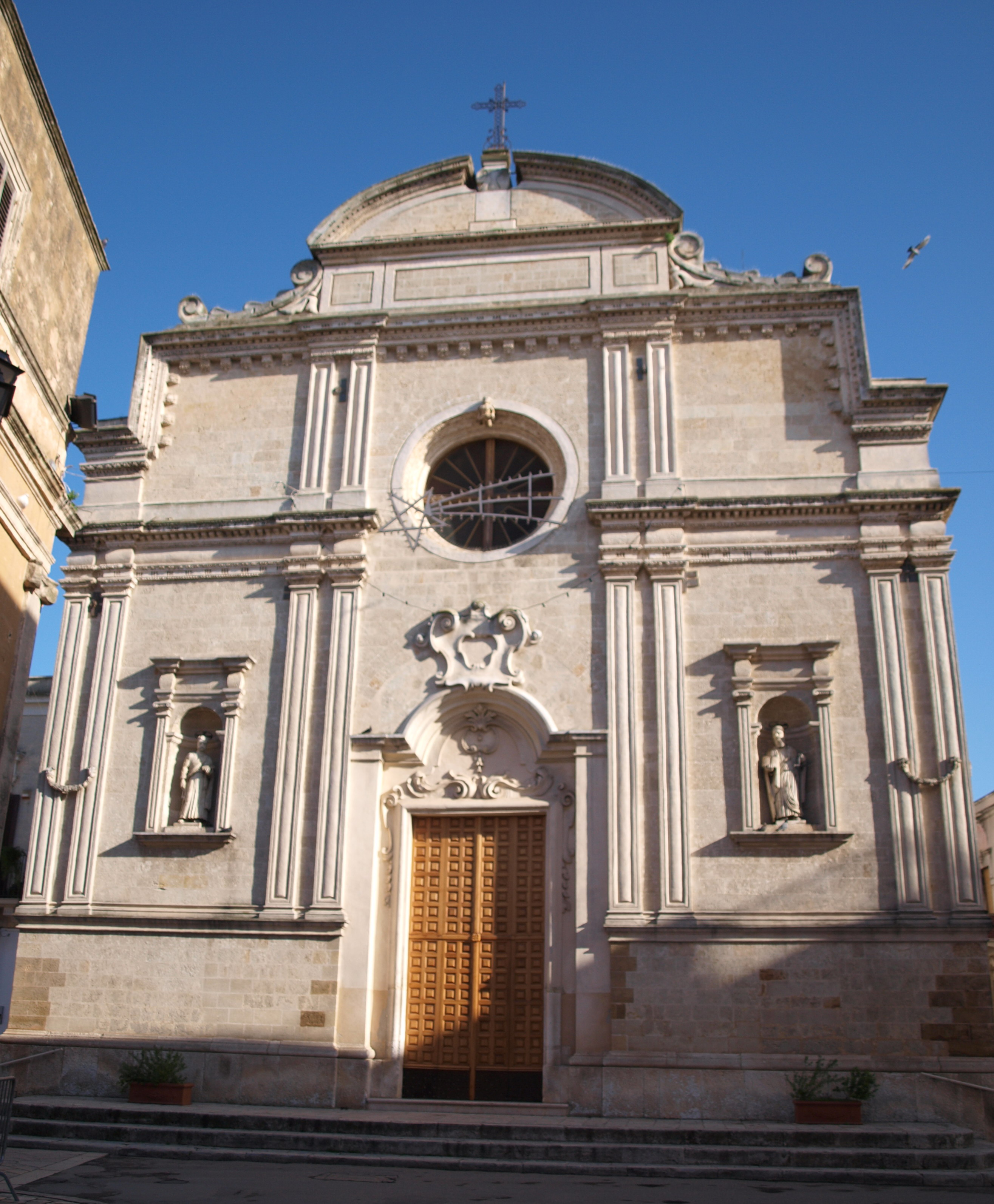 Latiano (BR), Italy: Chiesa Matrice (santa Maria della Neve)